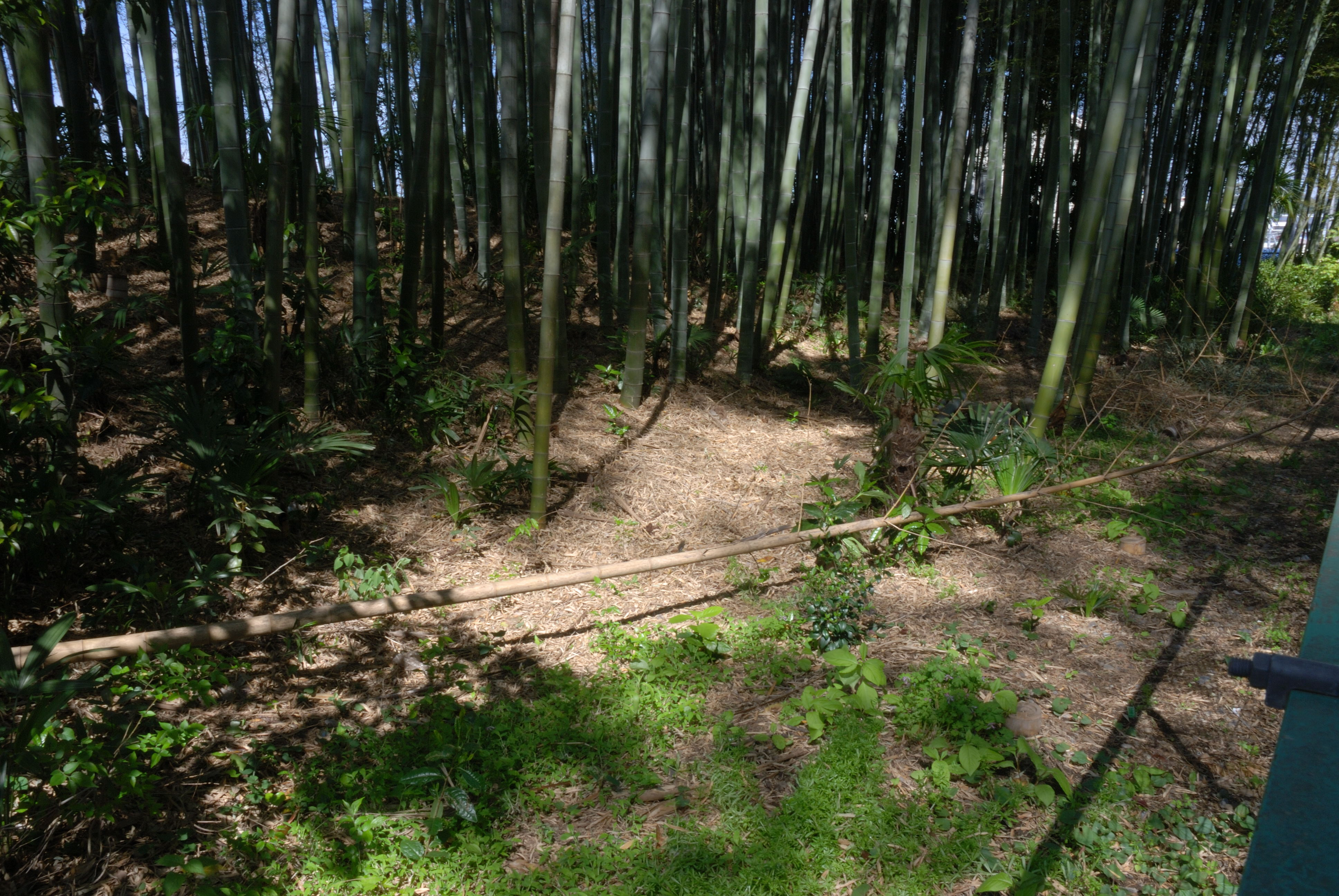 Sakuramachi dorui